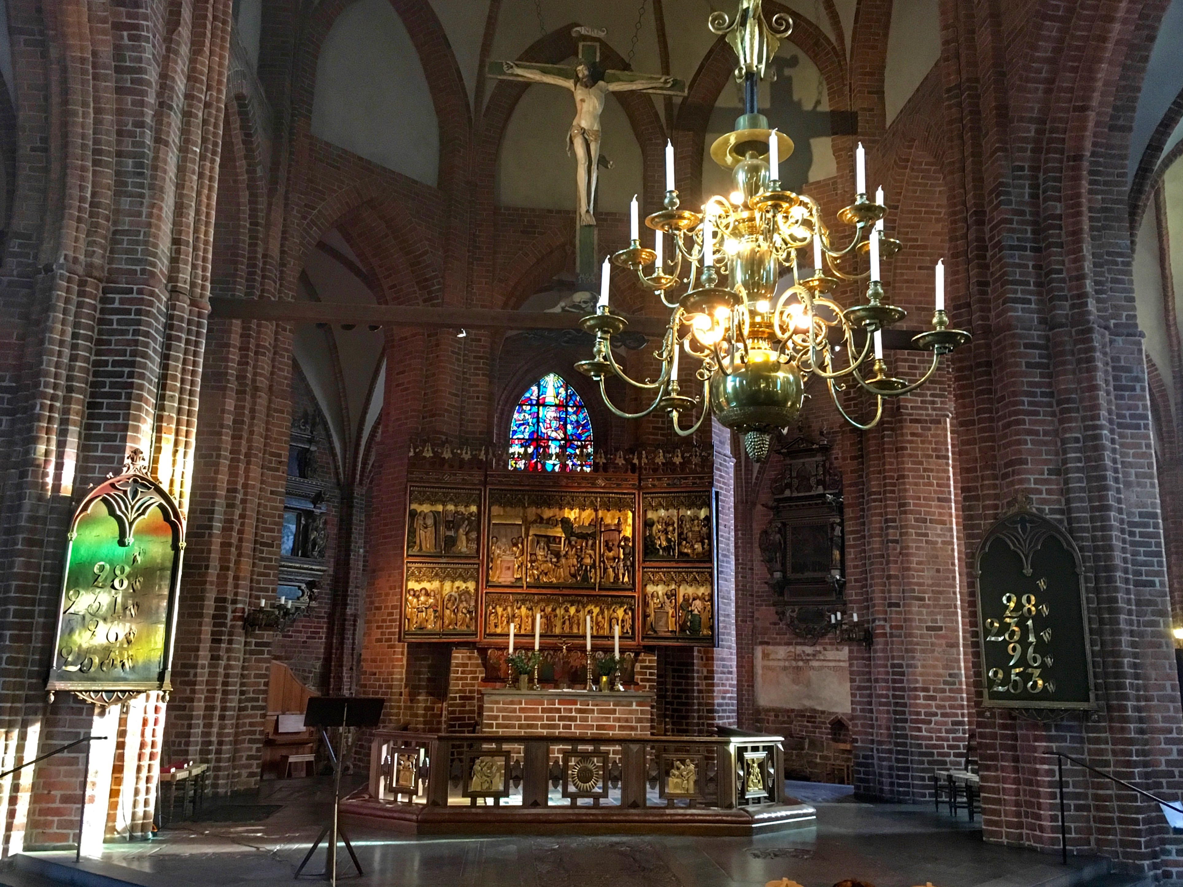 Fra Sankt Maria Kirke i Helsingborg